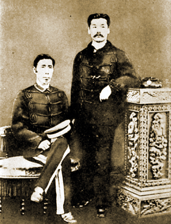 山県有朋中将（左）と福原和勝大佐（右）